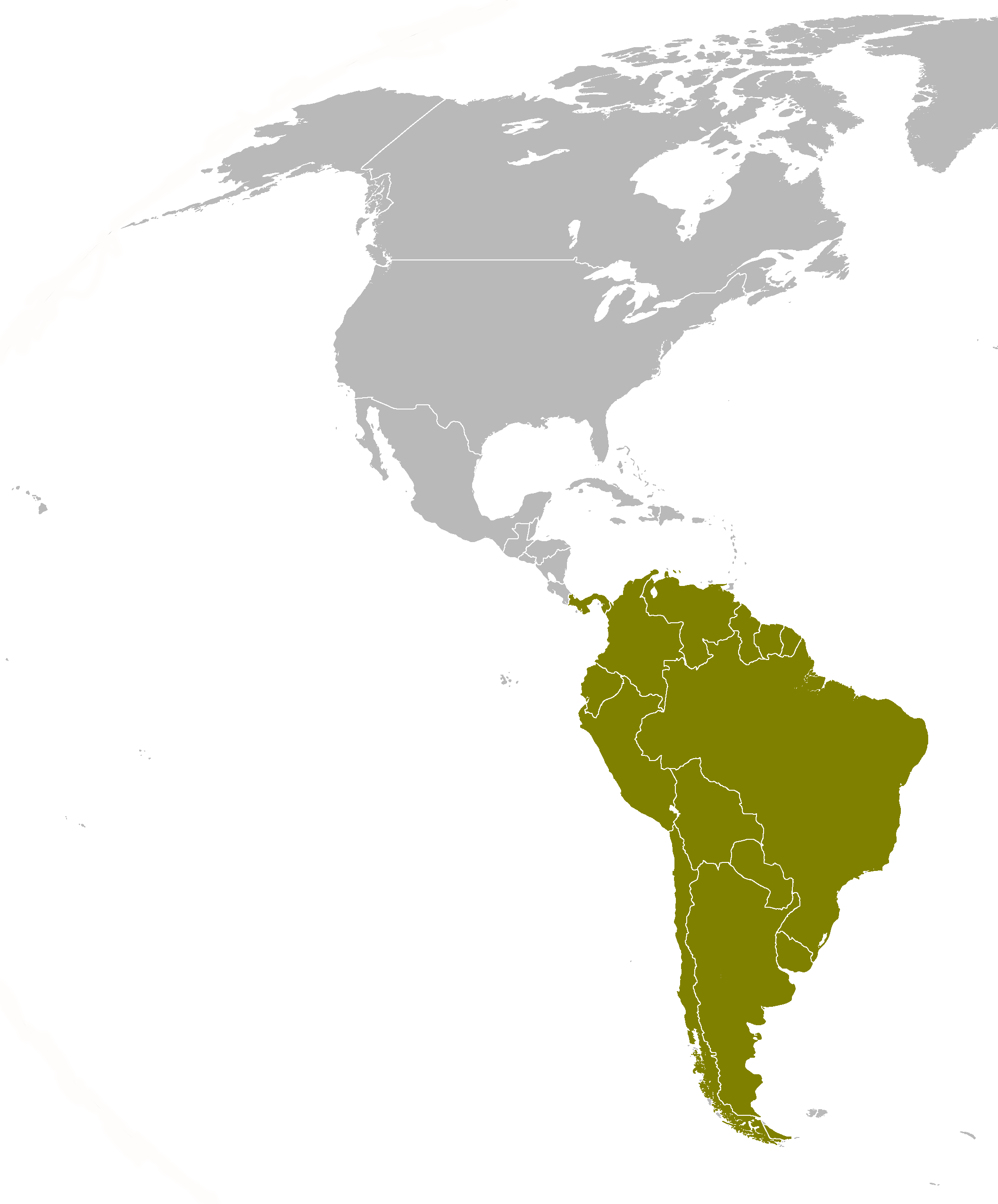 ODESUR members